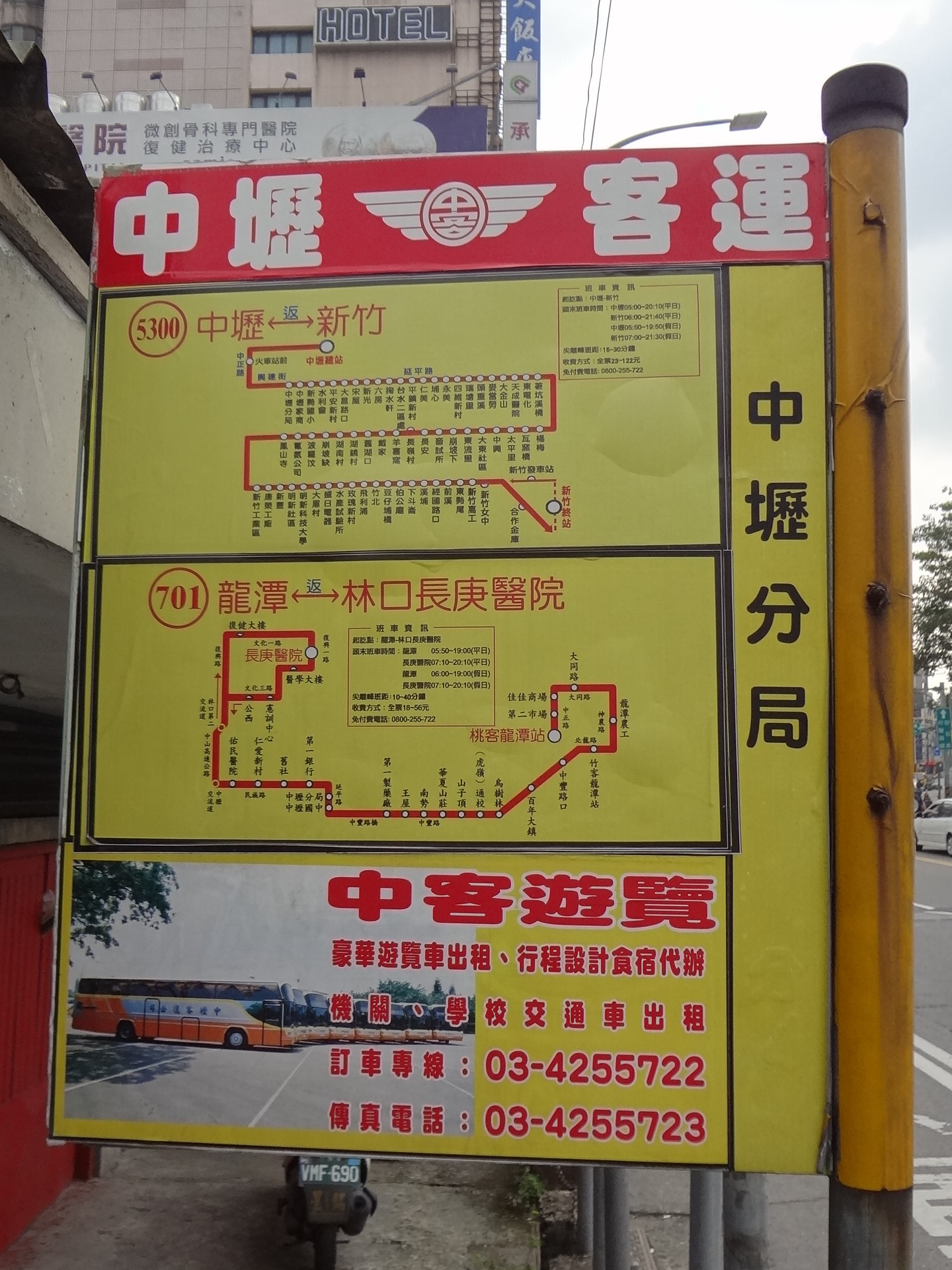 中壢客運「中壢分局」站牌。